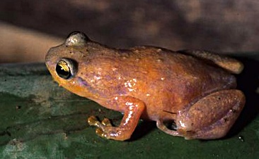 Cophyla berara Nouvelle version de Cophyla berara.jpg : recadrage ; niveaux.